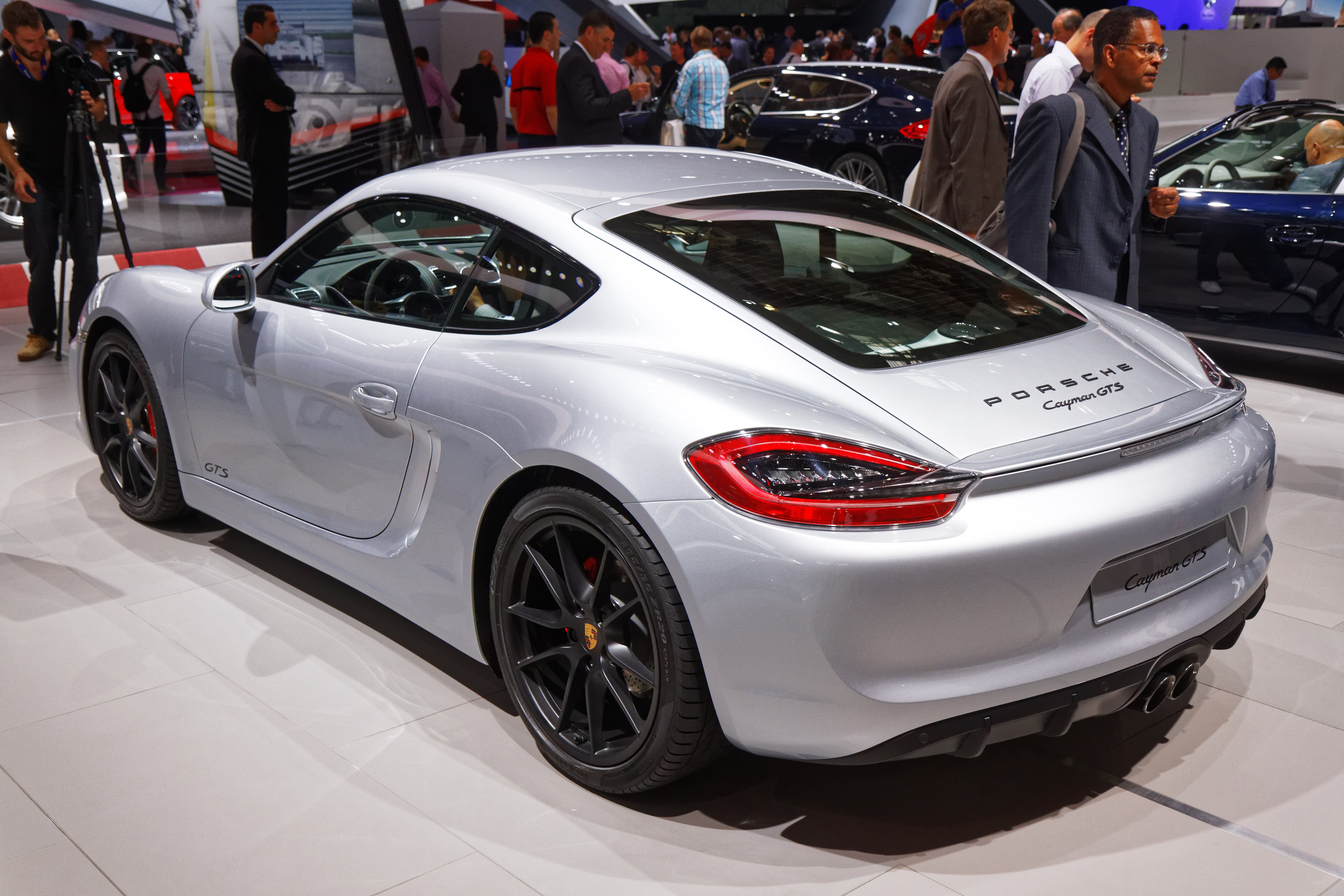 Une Porsche Cayman GTS présentée lors du mondial de l'automobile de Paris 2014.